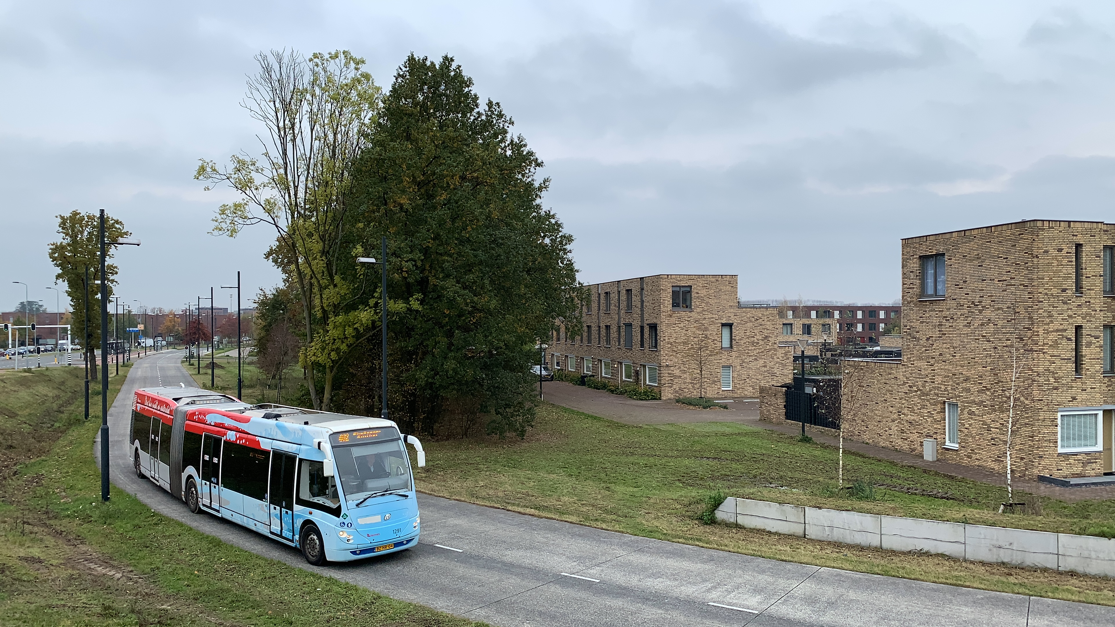 Een waterstofbus van Hermes te Eindhoven.